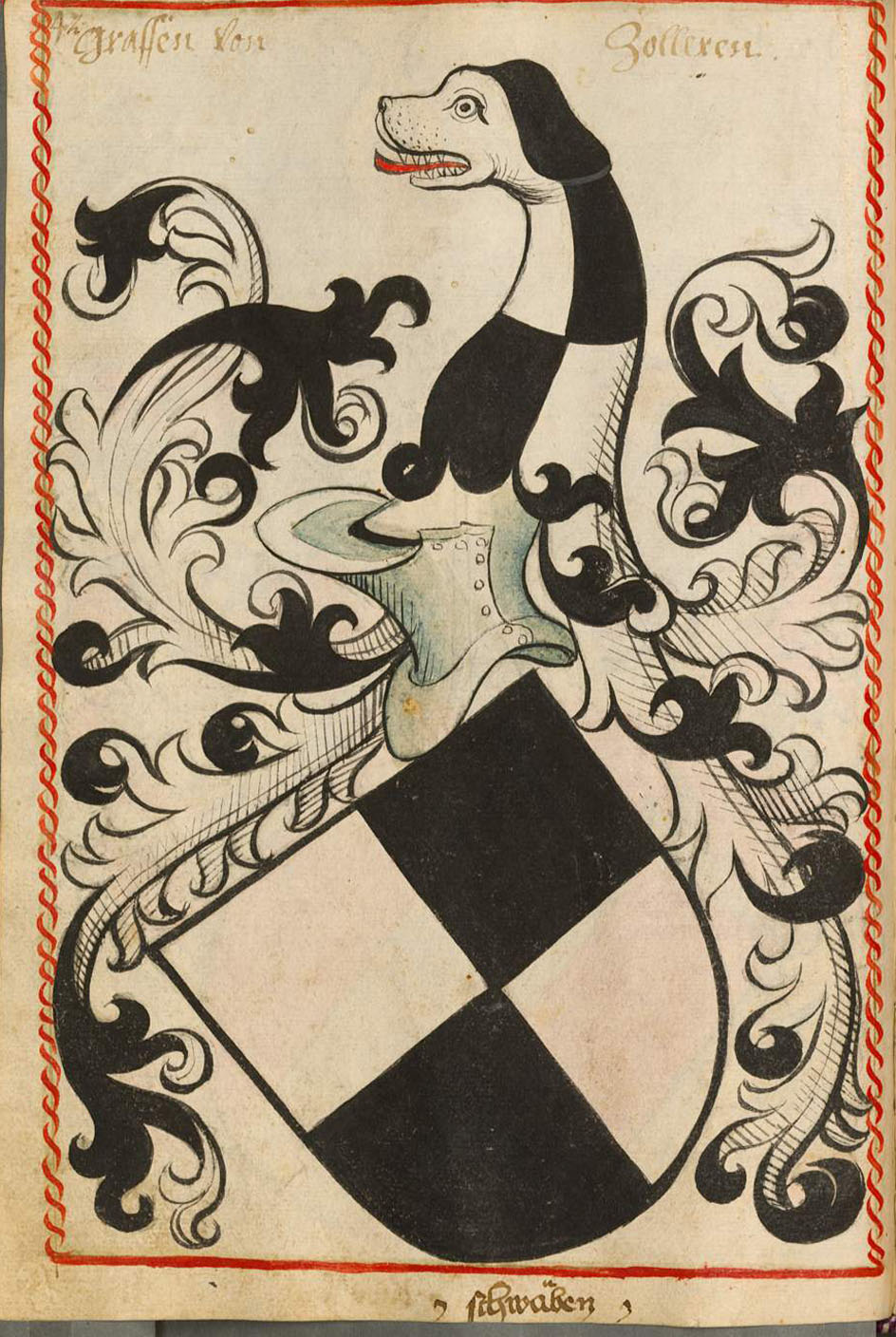 Scheibler'sches Wappenbuch, älterer Teil Zollern